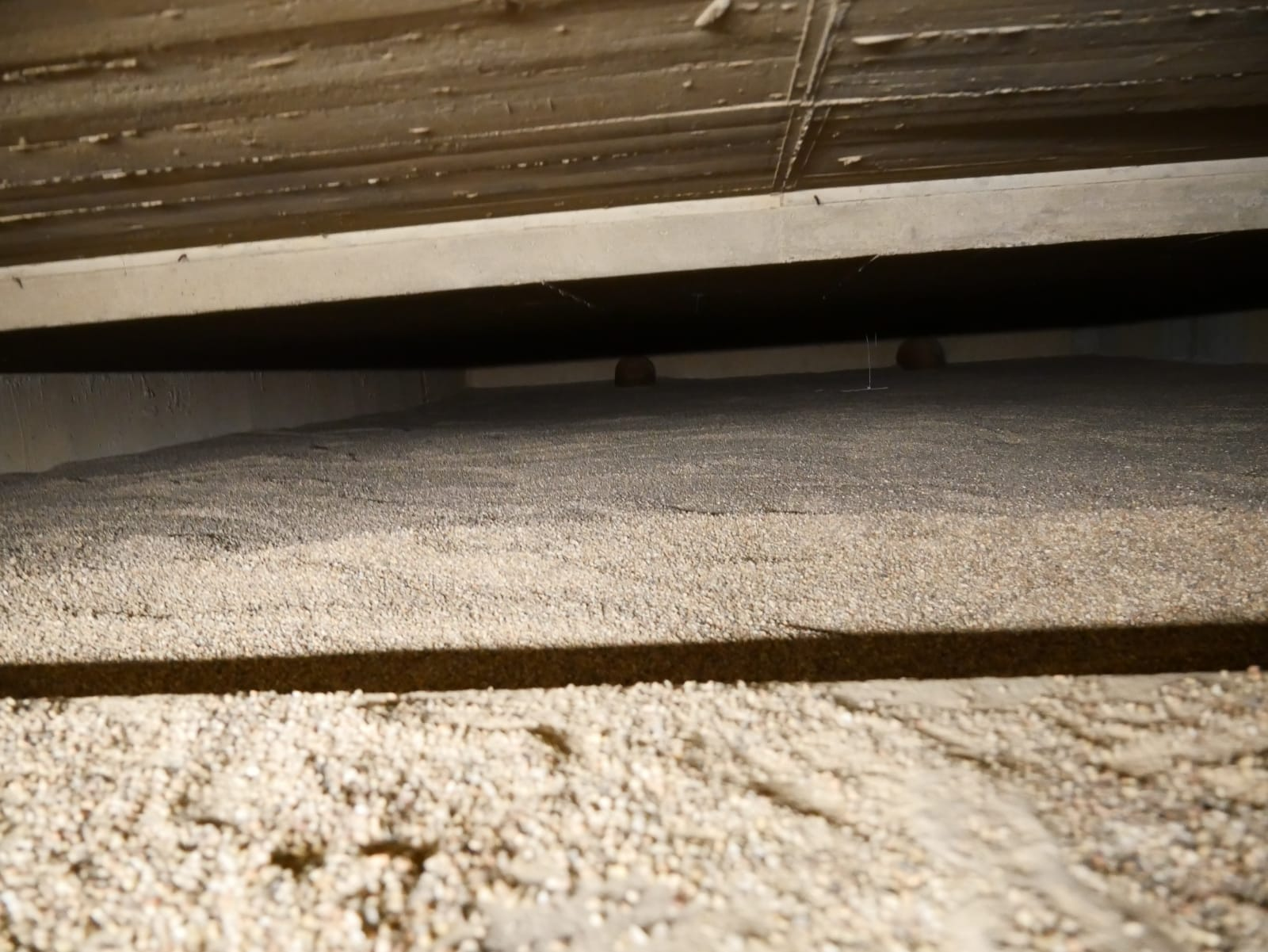 Ein Blick auf den Sandfilter.